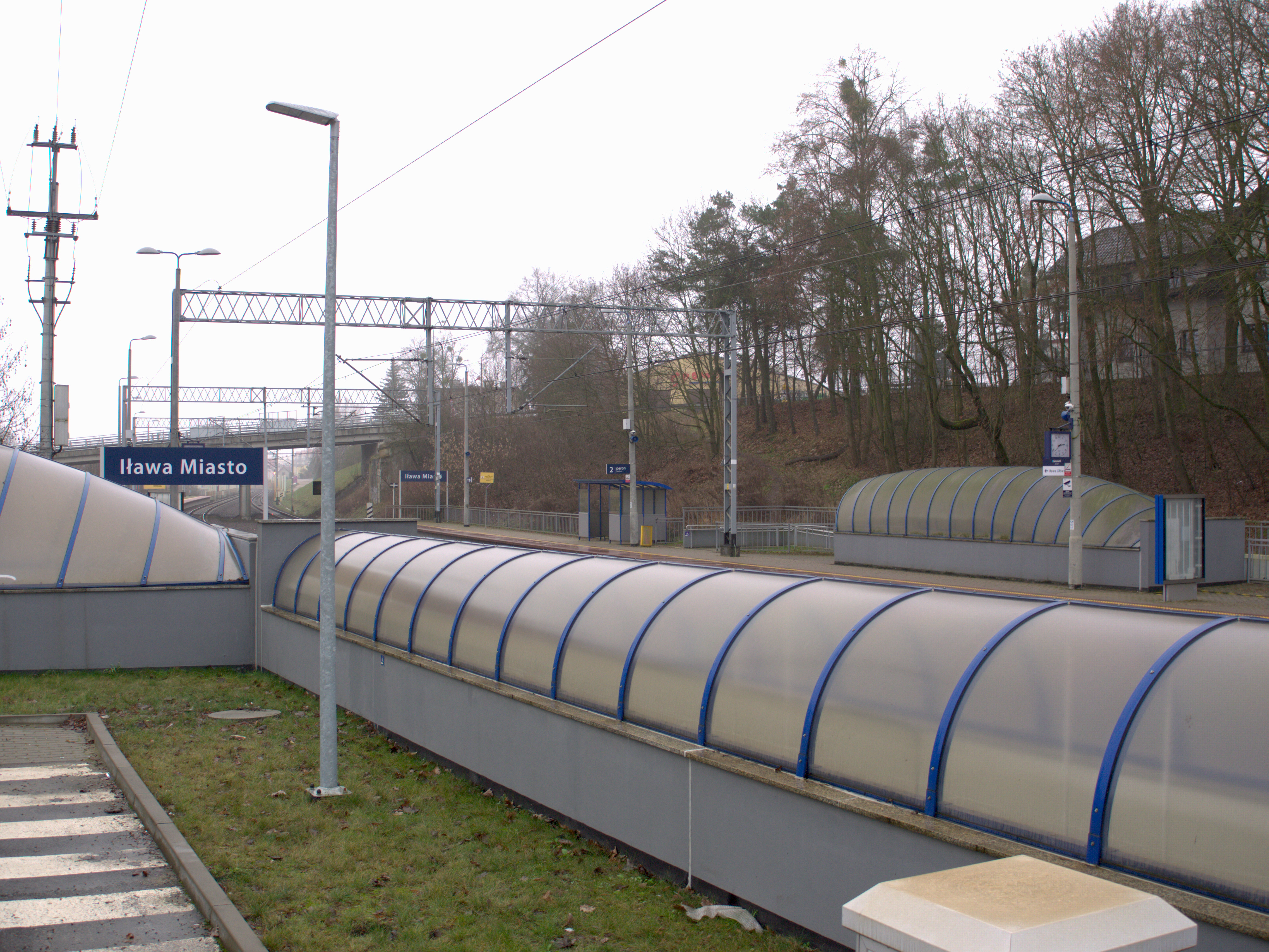 Stacja kolejowa Iława Miasto.